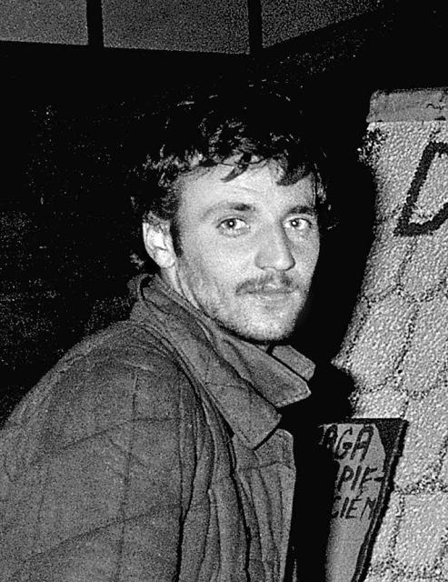 Andrzej Kolodziej w Stoczni